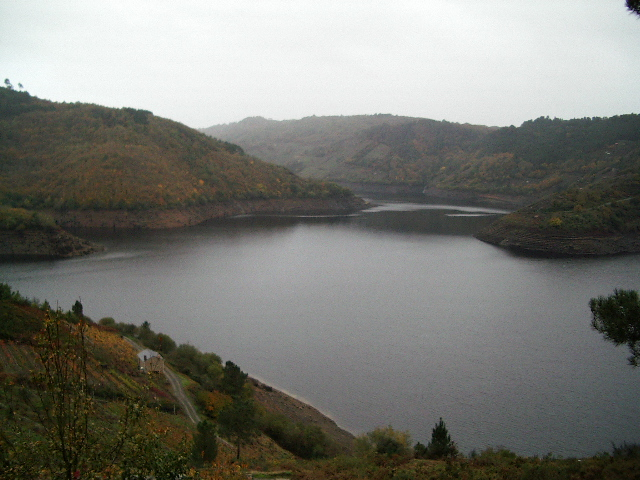 Embalse de Belesar a la altura de San Vitorio de Ribas de Mino en O Savinao (Lugo, Espana), cerca de la desembocadura del rio Sardineira. Vista desde las vinas. Picture taken by me in November 2006.